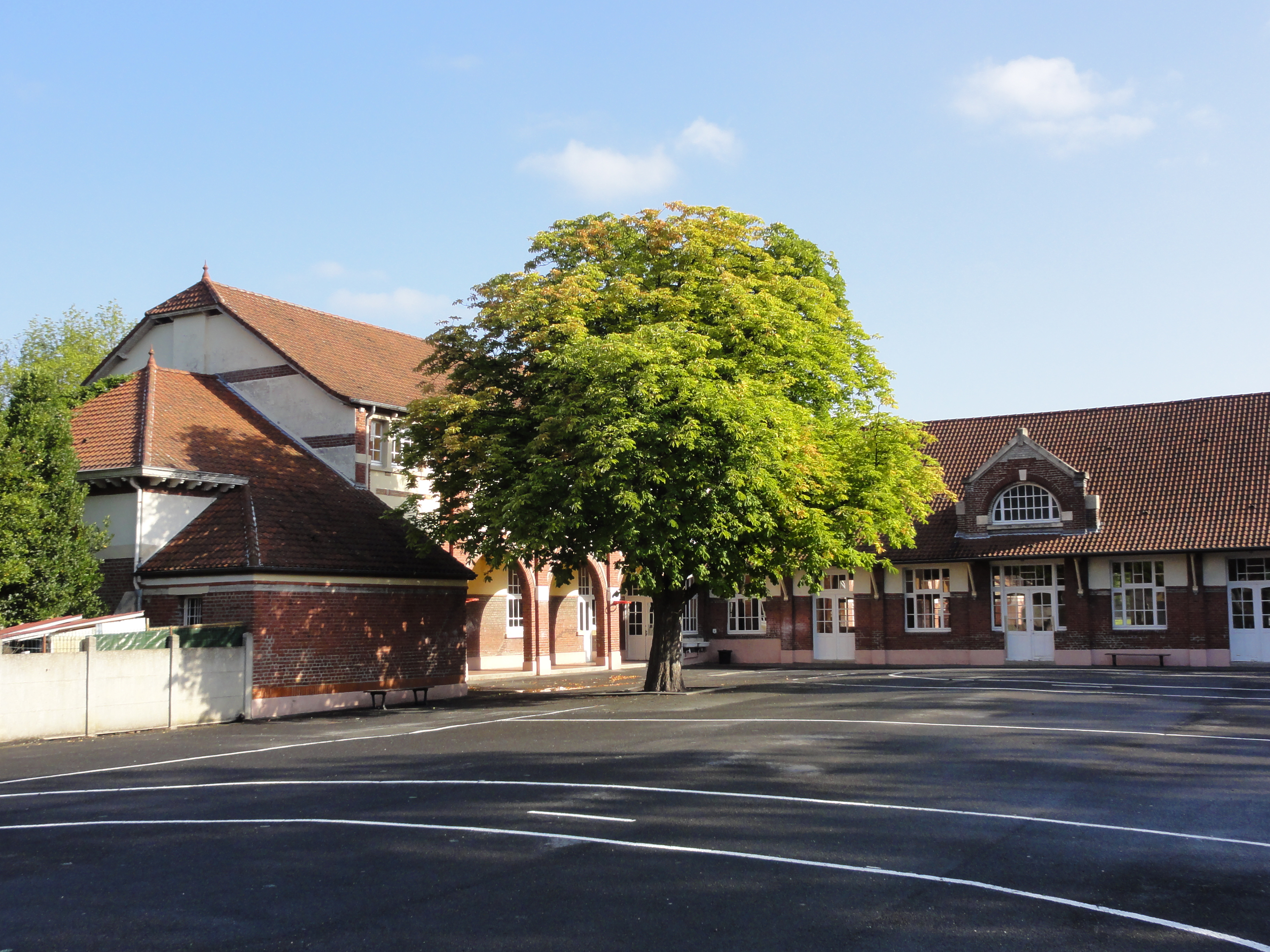 Écoles des cités de la Fosse Barrois de la Compagnie des mines d'Aniche, Montigny-en-Ostrevent, Nord, Nord-Pas-de-Calais, France.